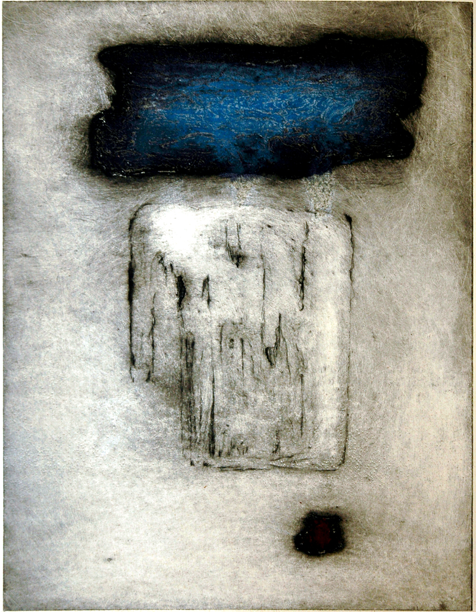 Romana Rotterová, MODRÝ OBLAK, kombinovaná technika,34x25 cm (1966)